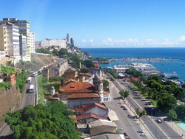 Cidade de Salvador vista do Elevador Lacerda. (Brasil)